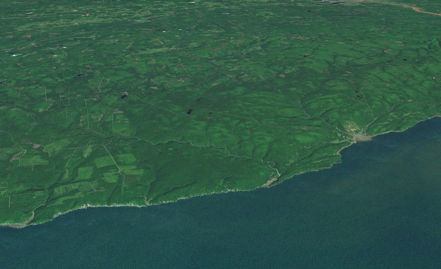 Le parc national de Fundy, en vue 3D à partir des données NASA World Wind Java SDK.